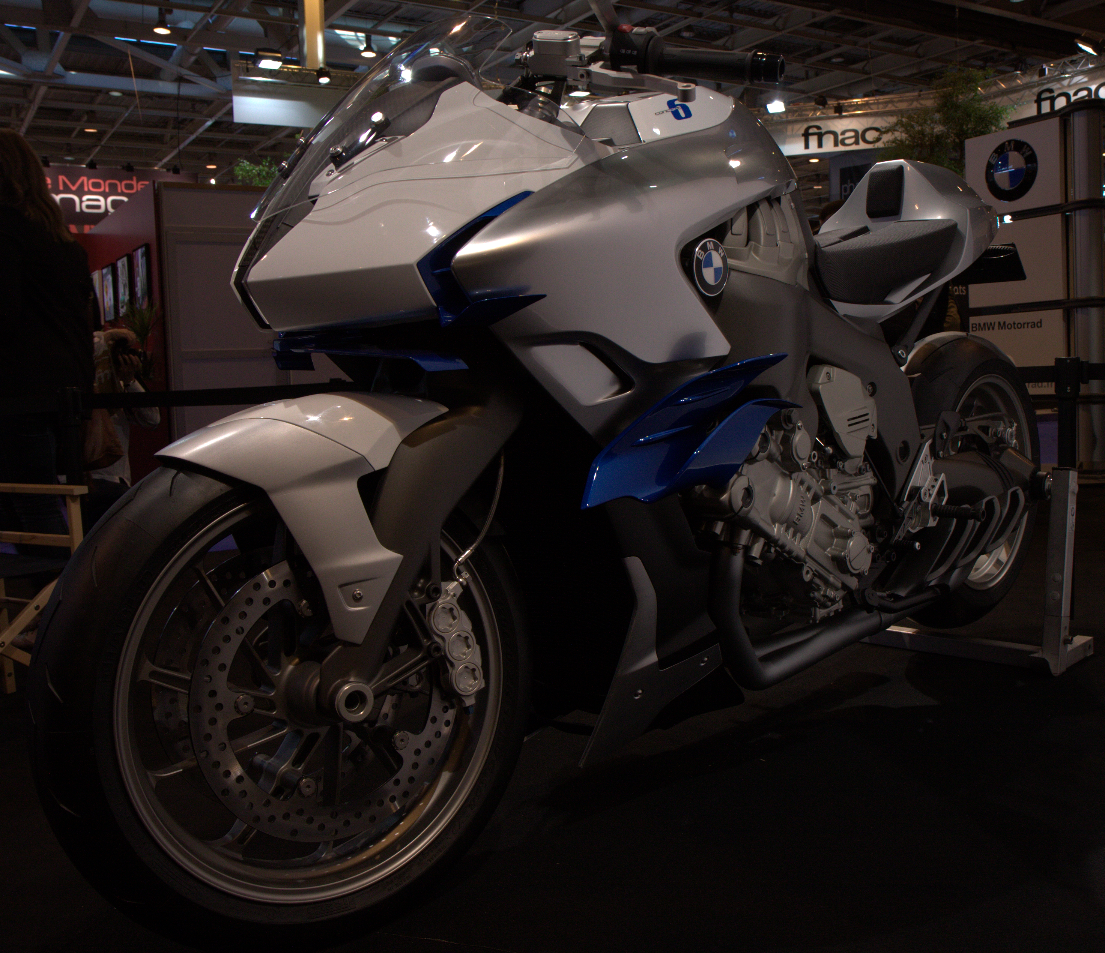 Concept 6 est une étude menée dont la finalité est de sortir une série de motos équipées d'un moteur 6 cylindres en ligne.